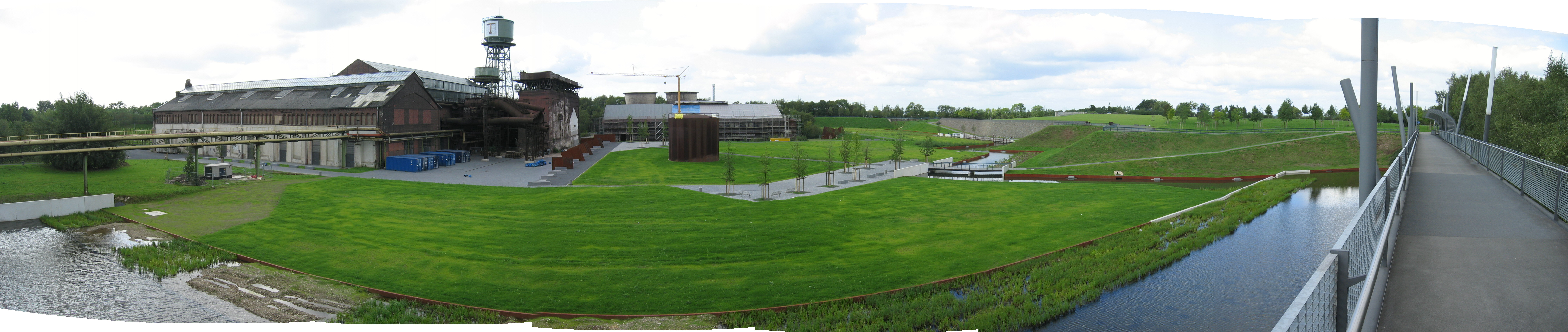 Blick von der Nordpolbrücke auf die Rückseite der Jahrhunderthalle, über die Wasserbecken und den Park.